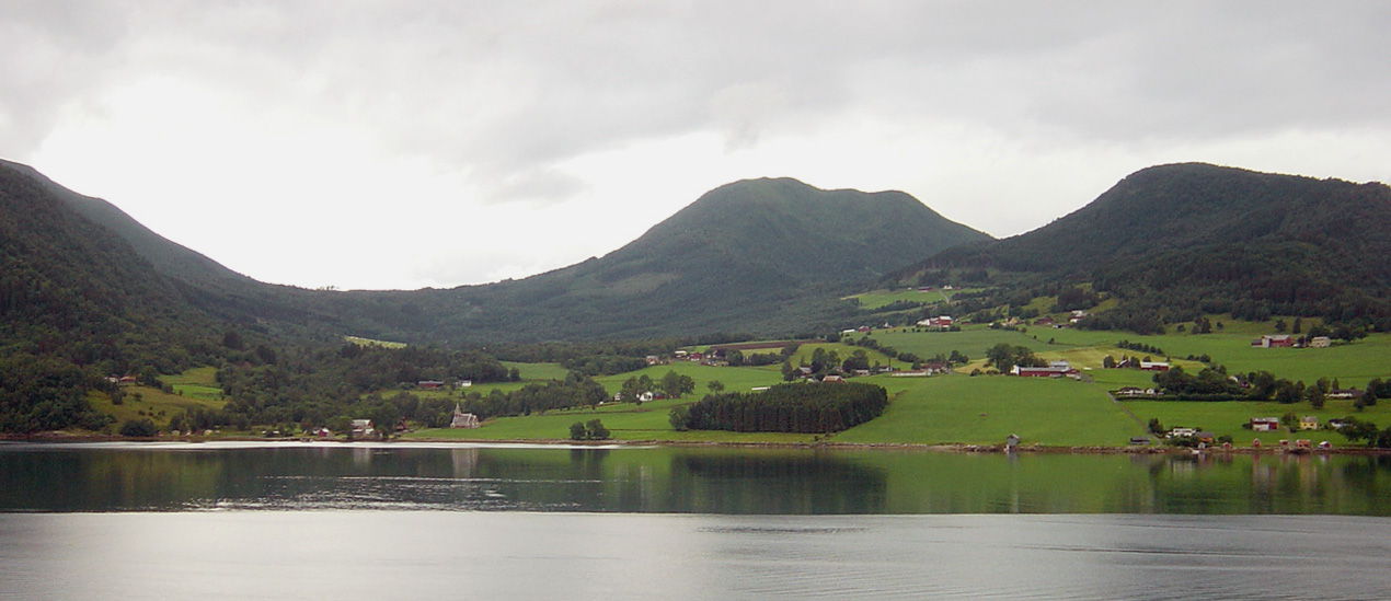 Rødvendalen, Rauma, in Norway